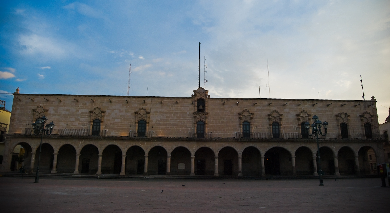 Fachada principal completa del Palacio de Zambrano desde plaza IV Centenario.